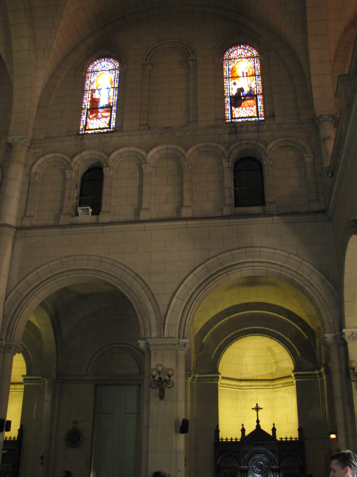 Plano de la nave (columna y arcos), galería alta y claristorio.